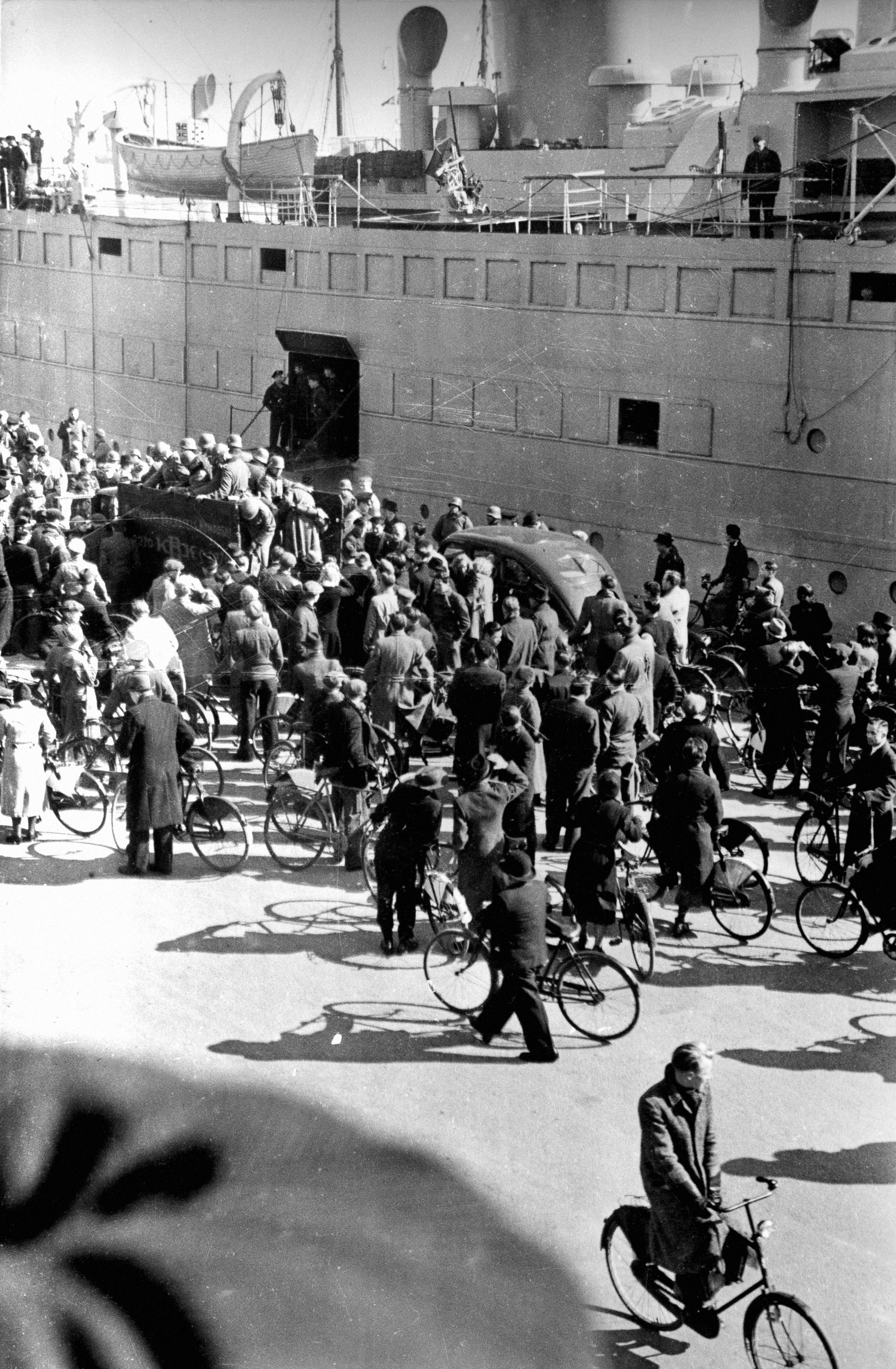 Det tyske transportskib Hansestadt Danzig ved Langelinie i København d. 9. april 1940. Københavnere ser til, mens skibet losses Se flere billeder her: Download and rights: More about The Museum of Danish Resistance (Frihedsmuseet)